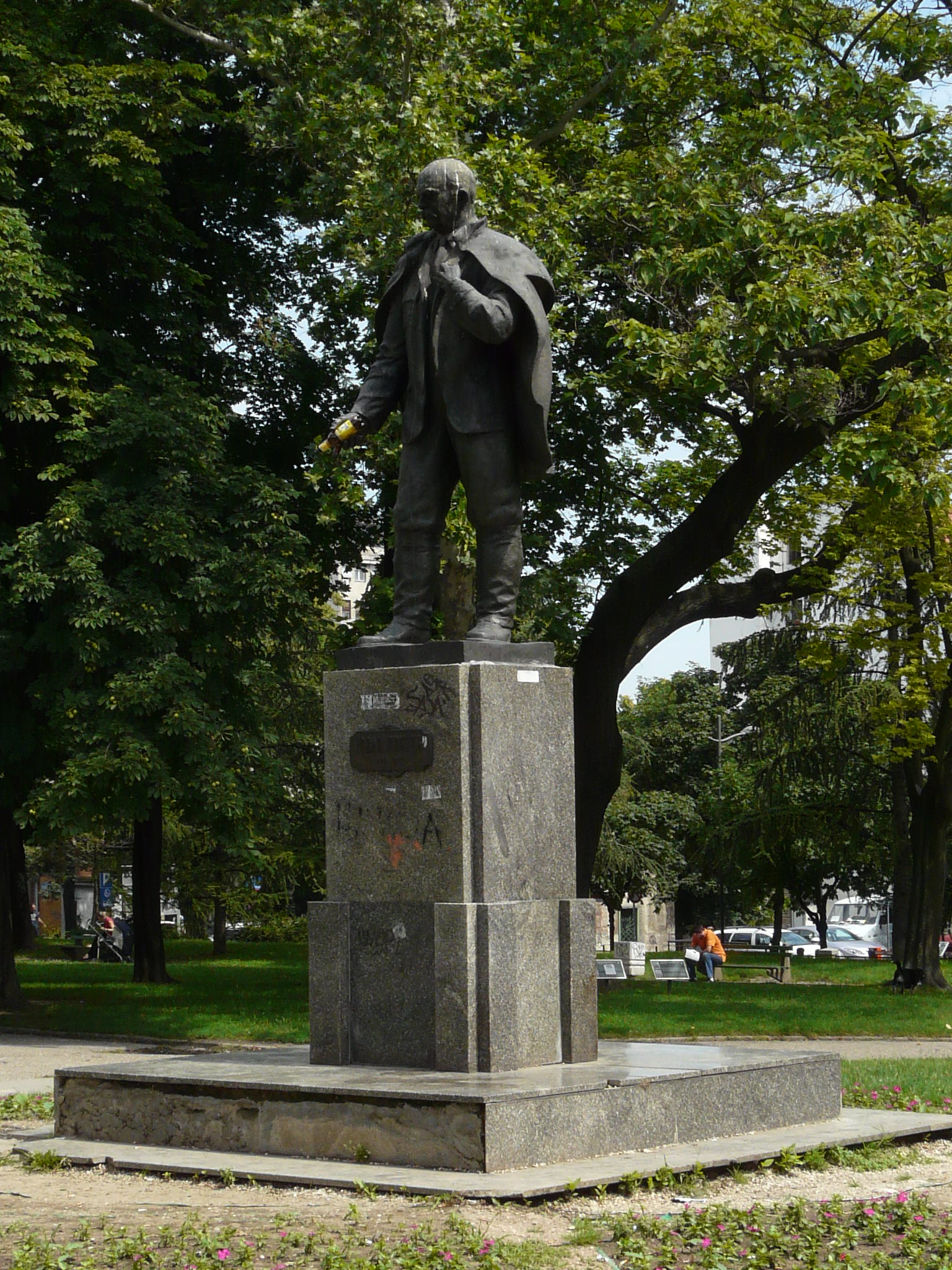 Паметник на Йован Цвиич